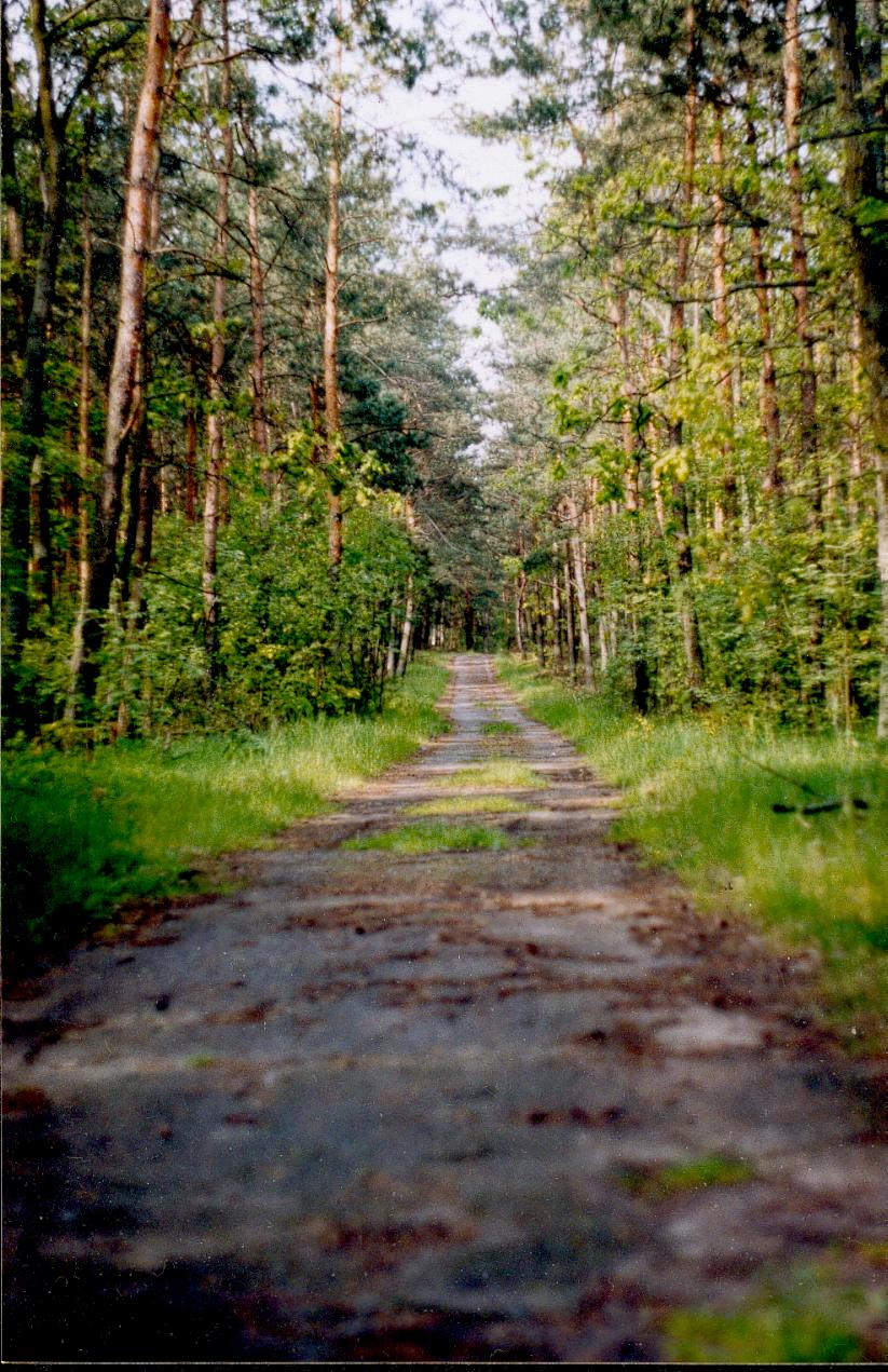 Droga rokadowa Przedmoście Warszawskie